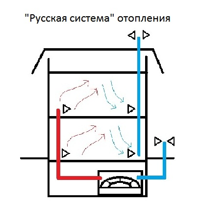 Принципиальная схема устройста "русской" системы отпления. Синим показан холодный или охлаждённый воздух, красным - нагретый.